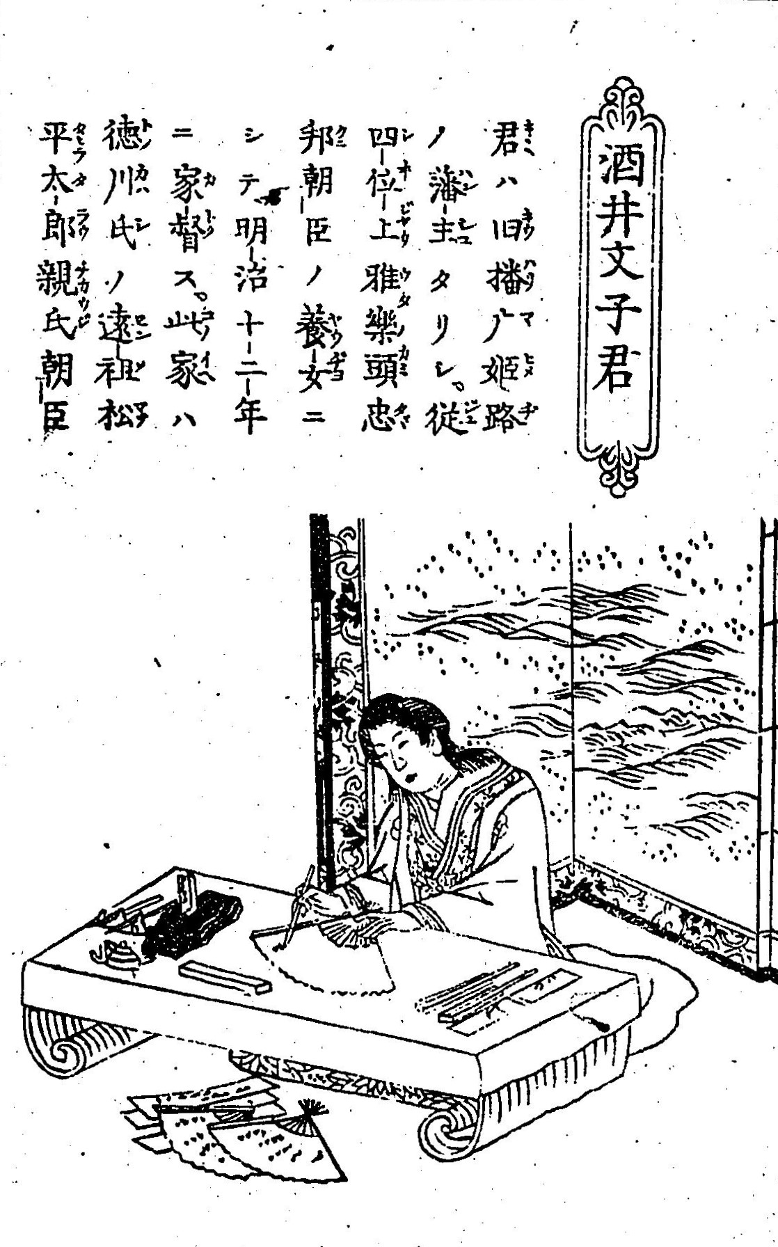 酒井宗家19代当主・酒井文子の肖像画。